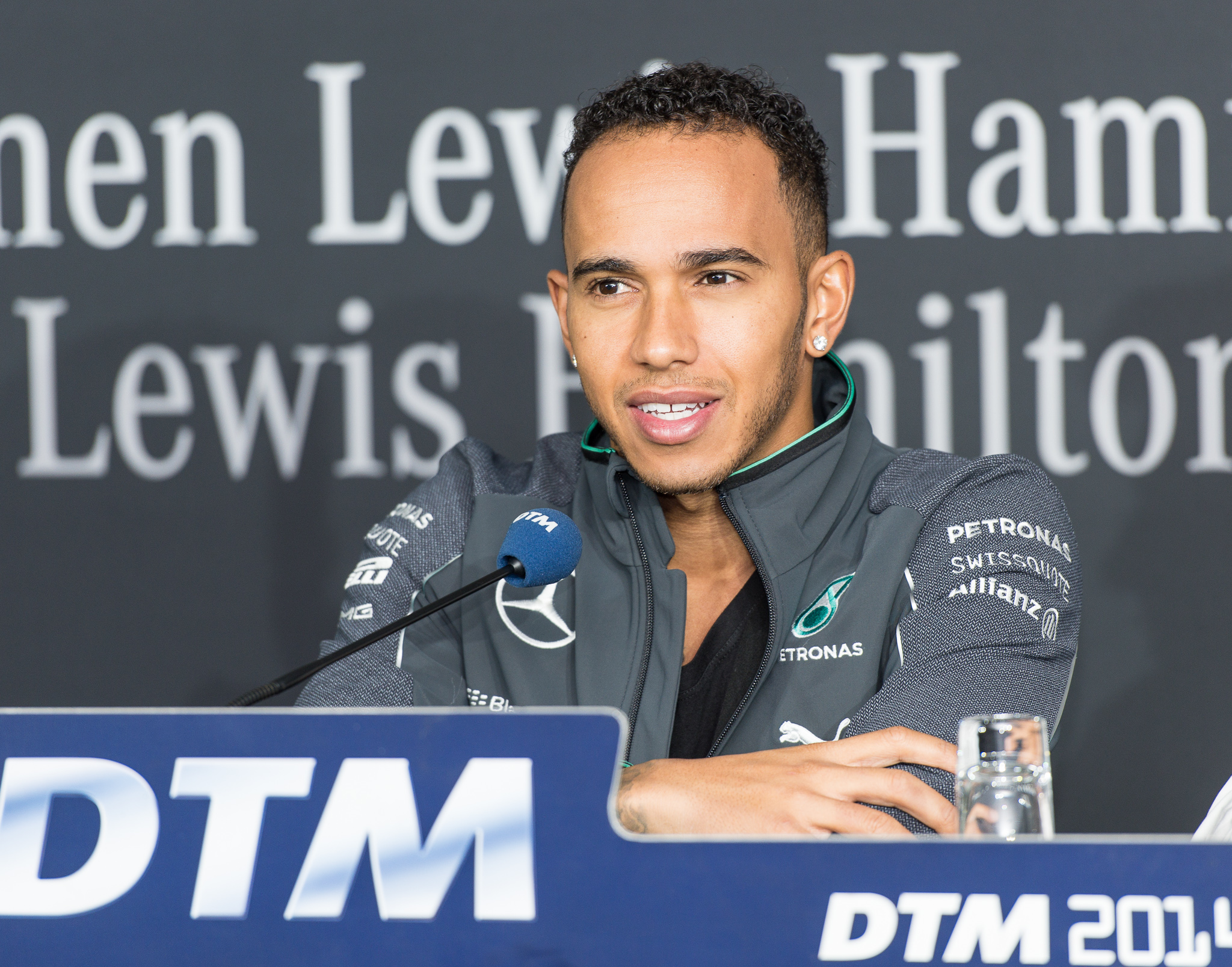 DTM,Deutsche Tourenwagen Masters,Hockenheimring,Lewis Carl Davidson Hamilton,Lewis Hamilton,Motorsport